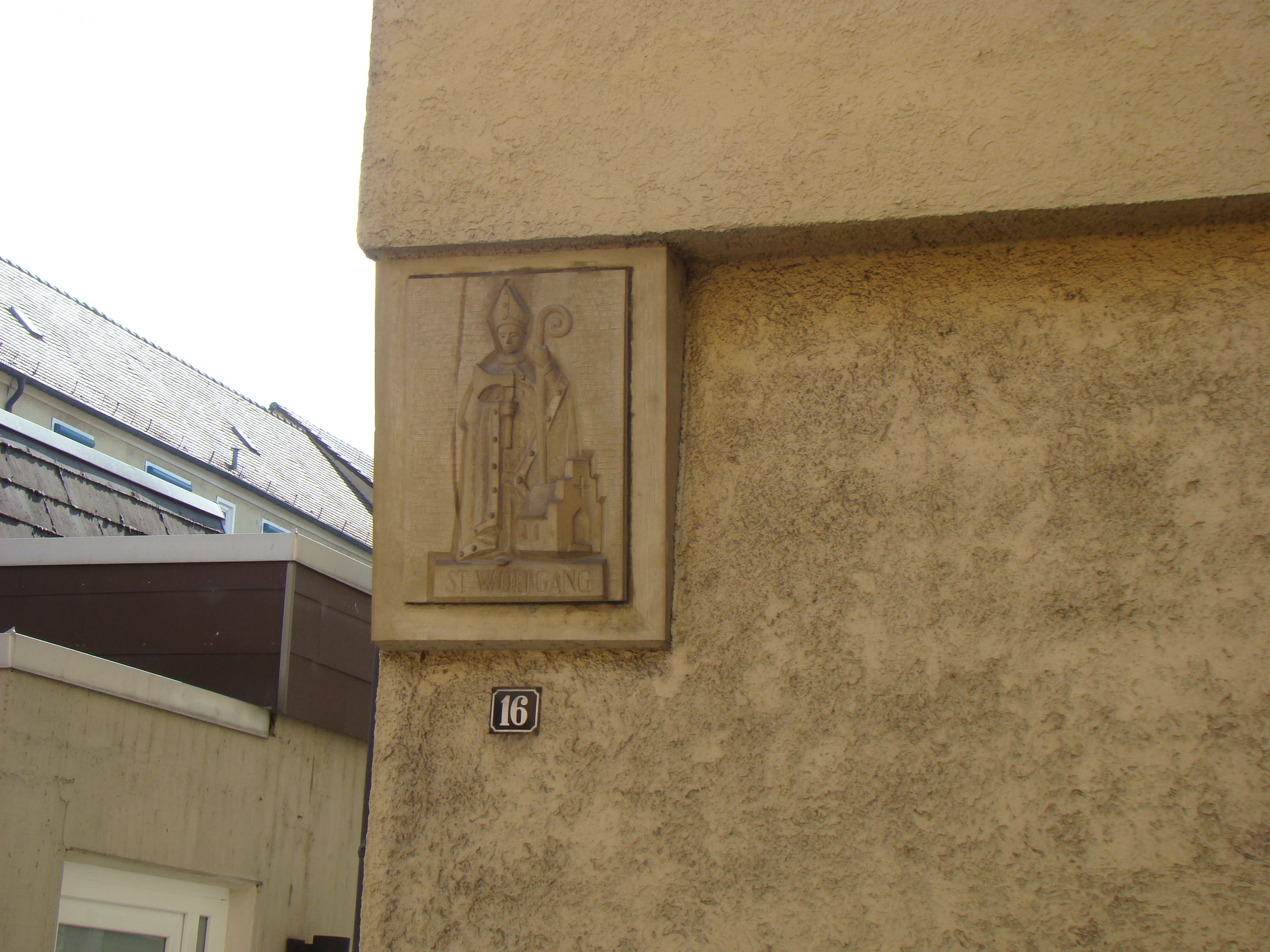 Fassadendetail mit Hl. Wolfgang an der Wolfganggasse 16 in Heilbronn